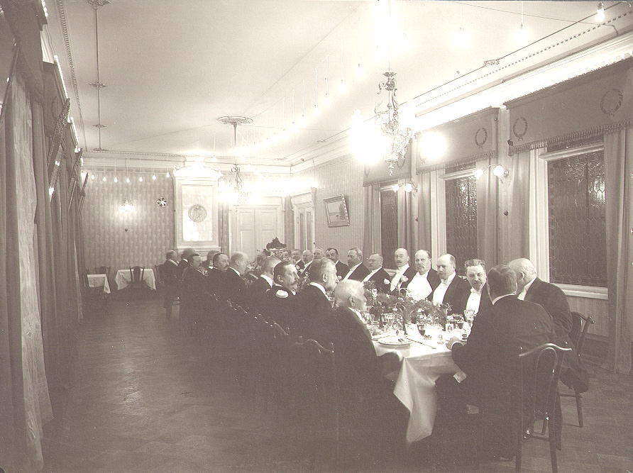 Hotel Phoenix in Turku, Finland.